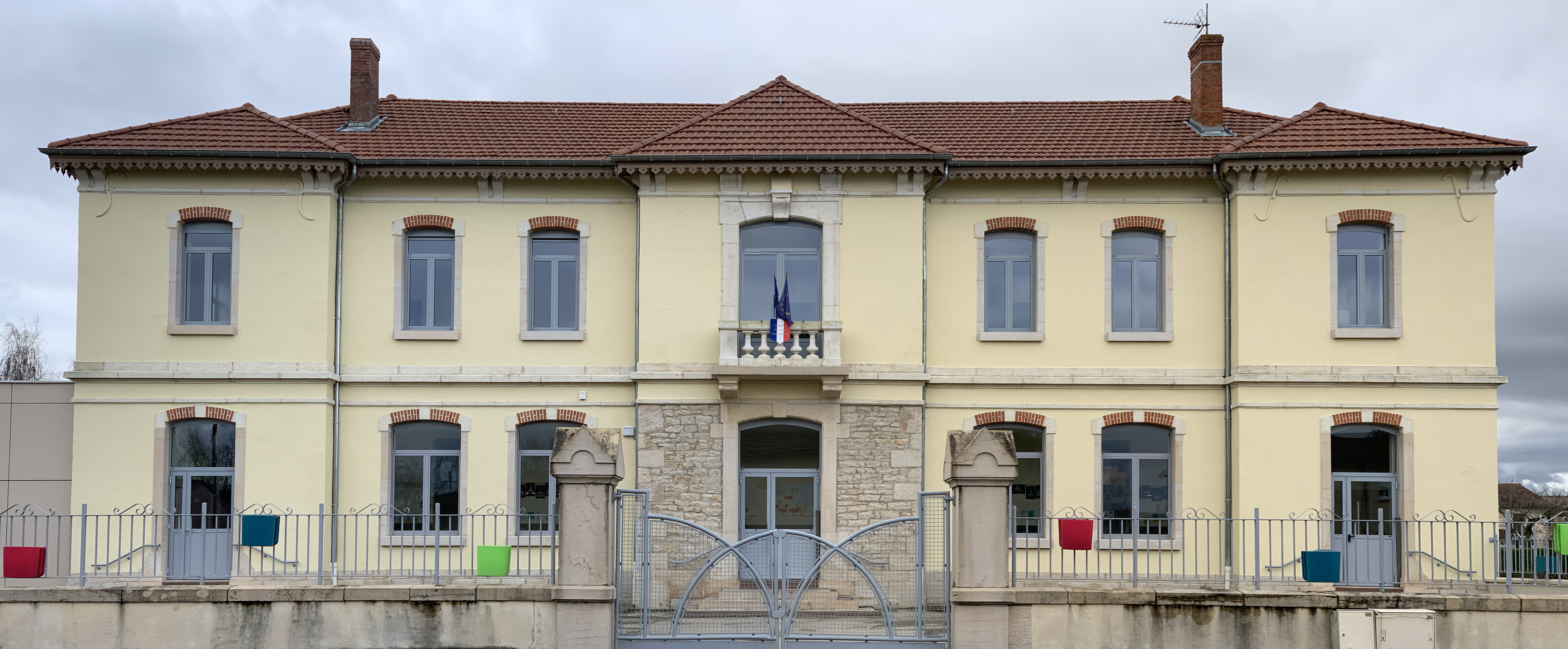 École Théodore Mercier, Saint-Jean-sur-Veyle.